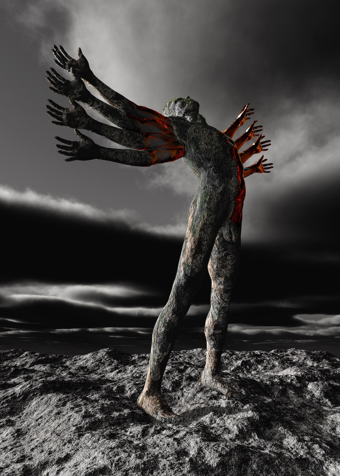 Infografía sobre papel montada en aluminio. 105x75 cm. Ícaros imposibles, en los que la misma idea de imposibilidad se da en ambos géneros. El cuerpo perfecto de cristal está ya colonizado por una superficie entre piedra y madera de la que va surgiendo vegetación.